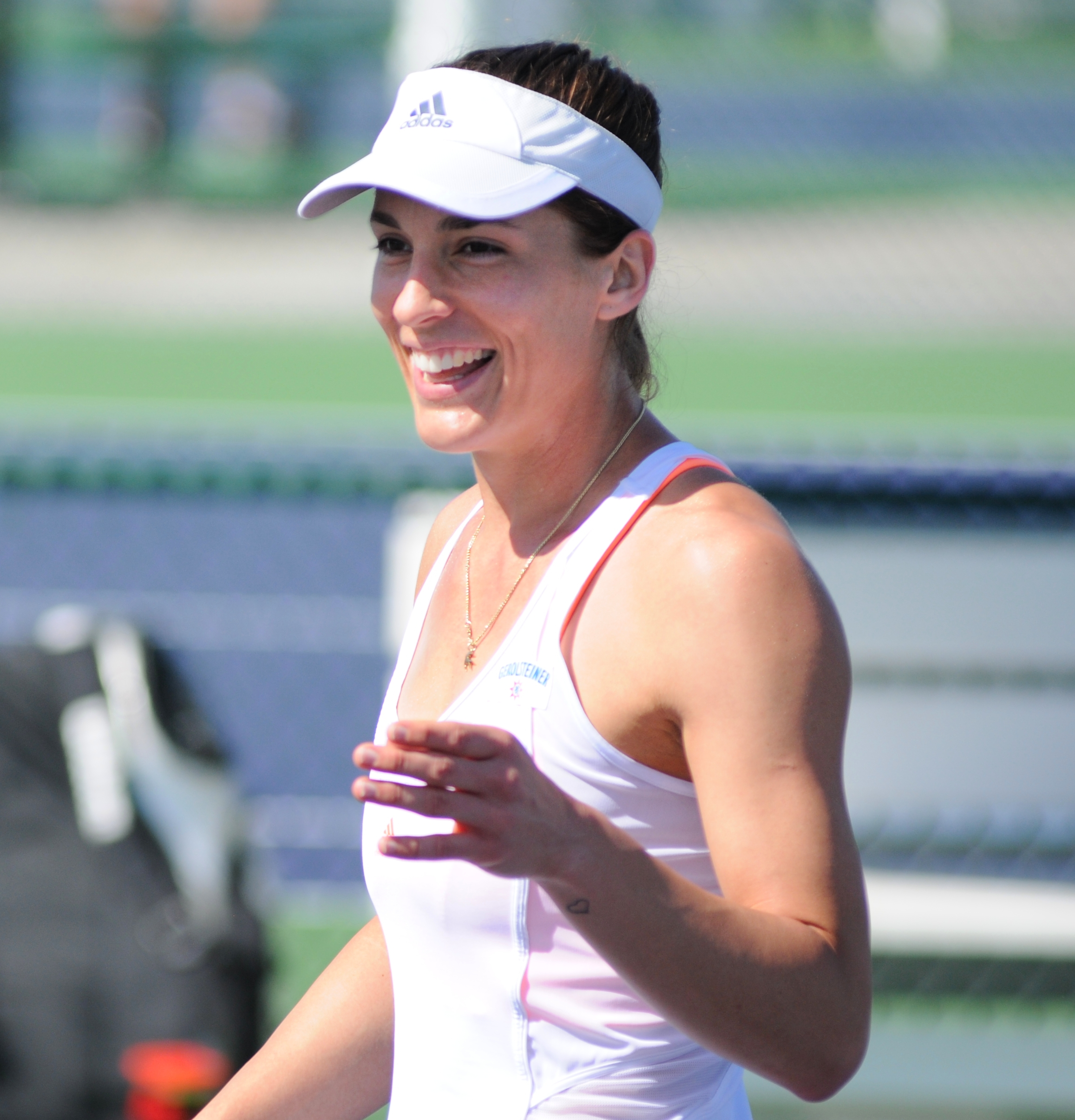 2014 BNP Paribas Open